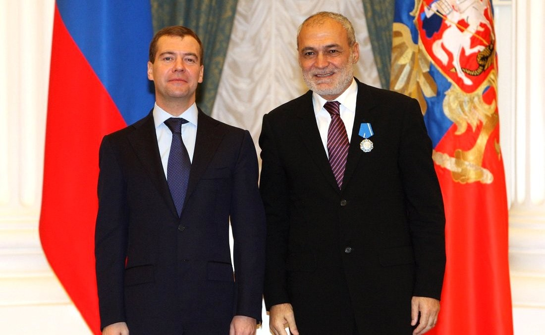 Андраник Мигранян